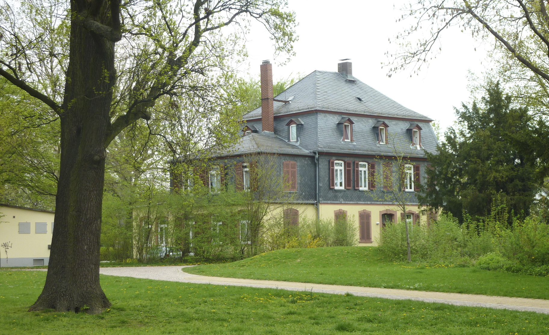 Frankfurt am Main, Stadtteil Unterliederbach: Der Graubnerpark ist eine öffentliche Grünanlage im Norden des Stadtteils. Der Park ging aus einem 1817 eingerichteten privaten Landschaftspark hervor. Die Stadt Höchst am Main, seit 1928 Frankfurt-Höchst, kaufte die Liegenschaft gleichzeitig mit der Eingemeindung Unterliederbachs nach Höchst im Jahr 1917 auf und widmete das Grundstück in einen öffentlichen Park um. Das Foto zeigt die im Jahr 1755 als Herrenhaus erbaute Graubnersche Villa am Nordrand des Parks, Ansicht von Südosten